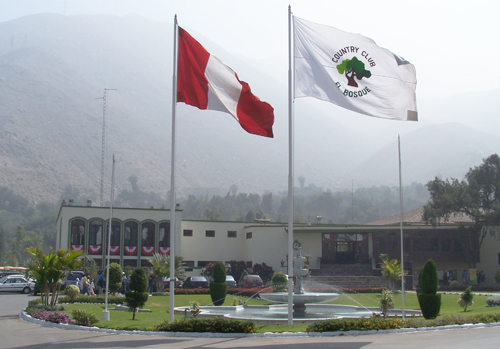 Pileta Principal y entrada del Country Club "El Bosque" Sede Chosica